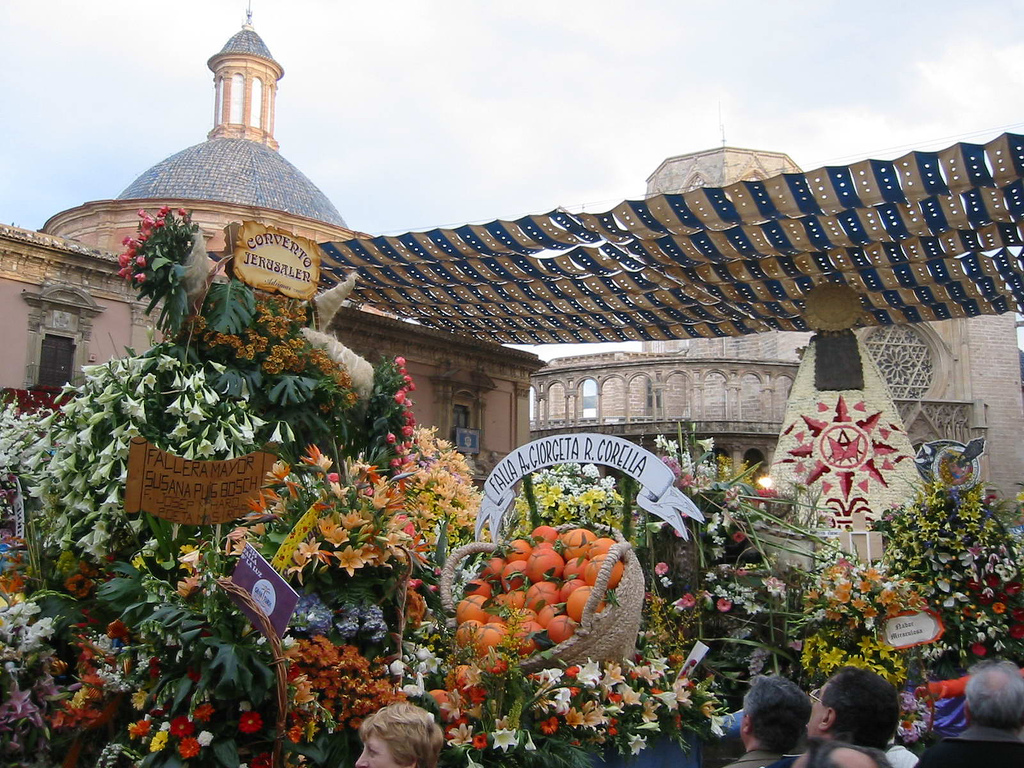 Ofrenda de flores a la Virgen de los Desamparados durante las Fallas. Flower offers to the Virgen de los Desamparados during Fallas.